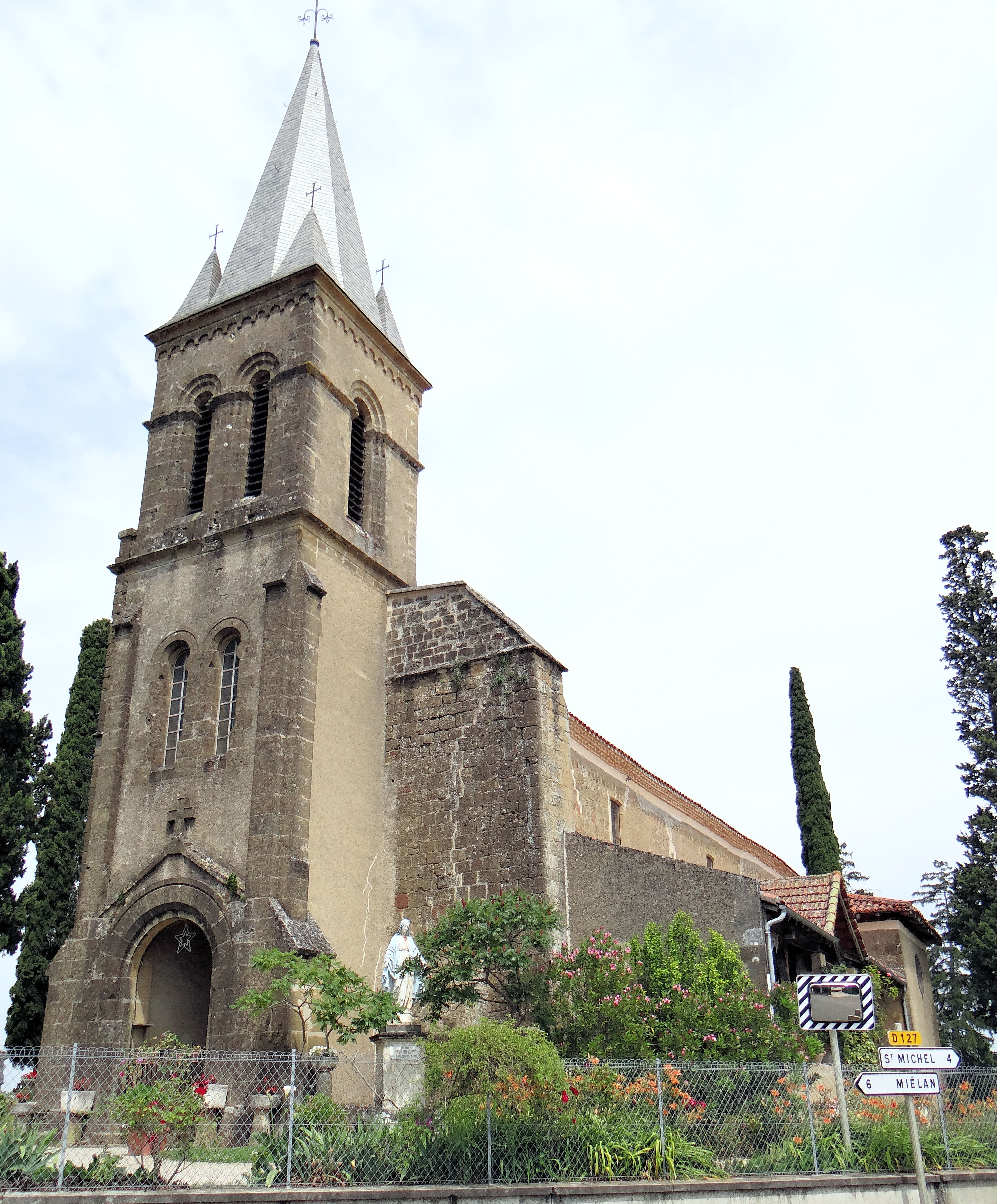 Sainte-Dode - Église Sainte-Dode - Clocher